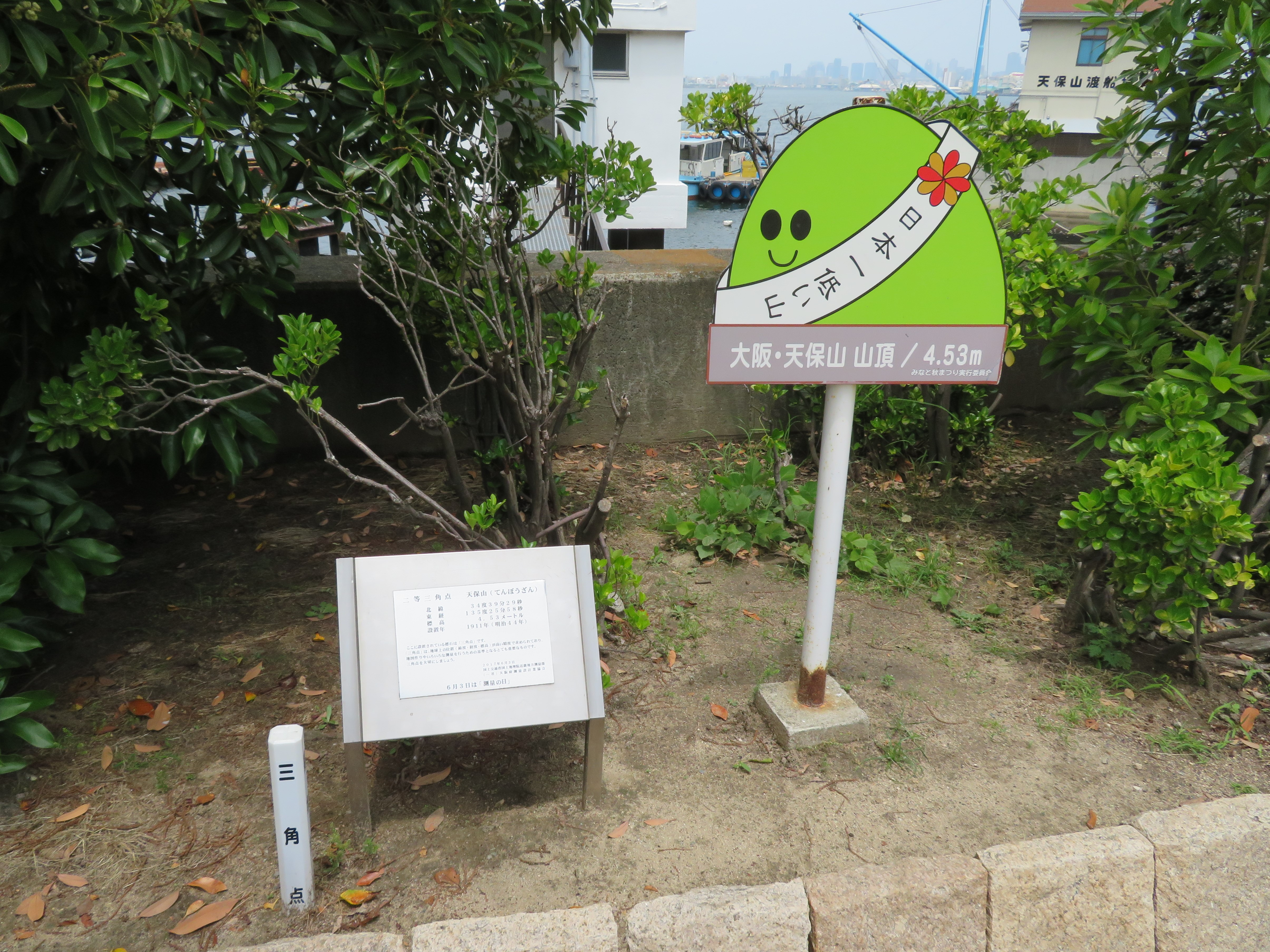 天保山山頂